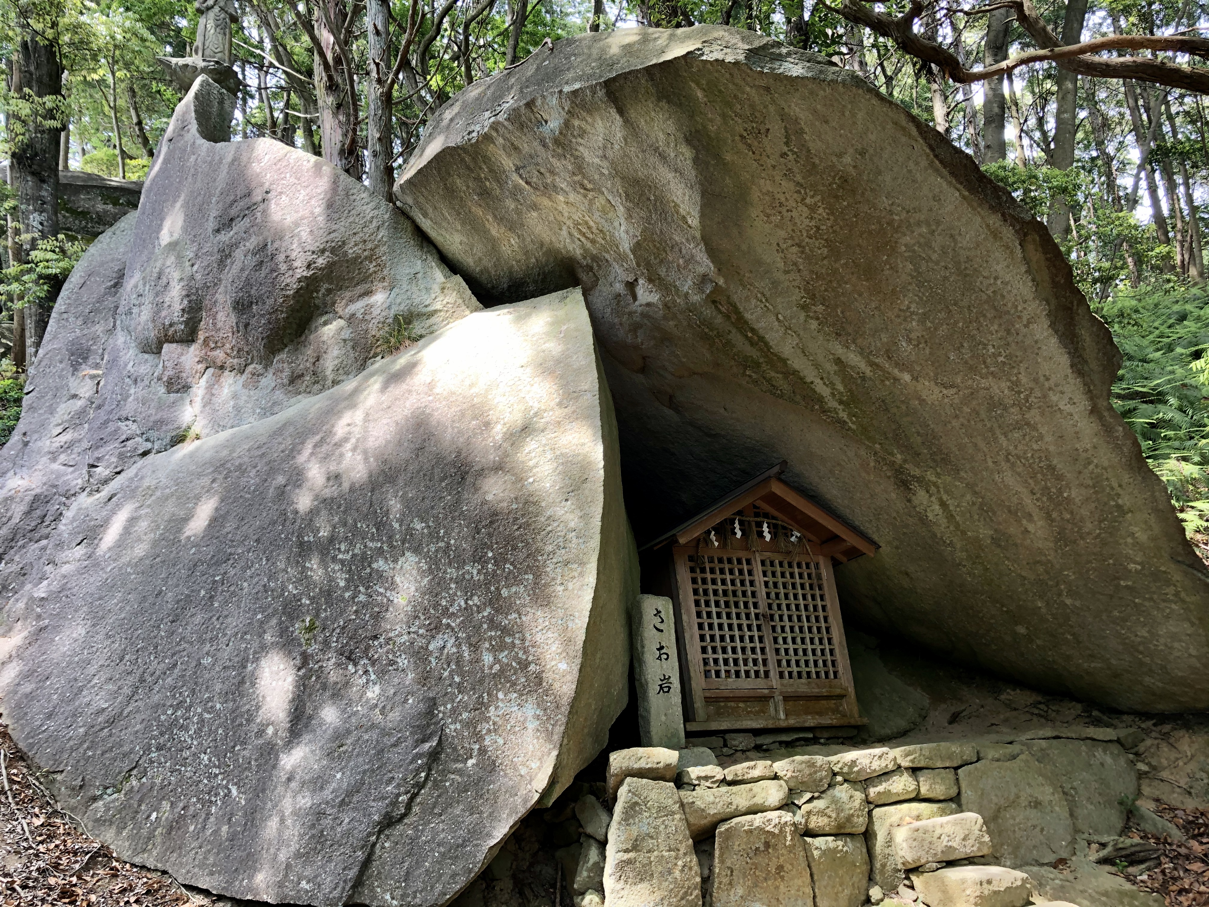 岩谷観音の祠。岡崎市岩中町。